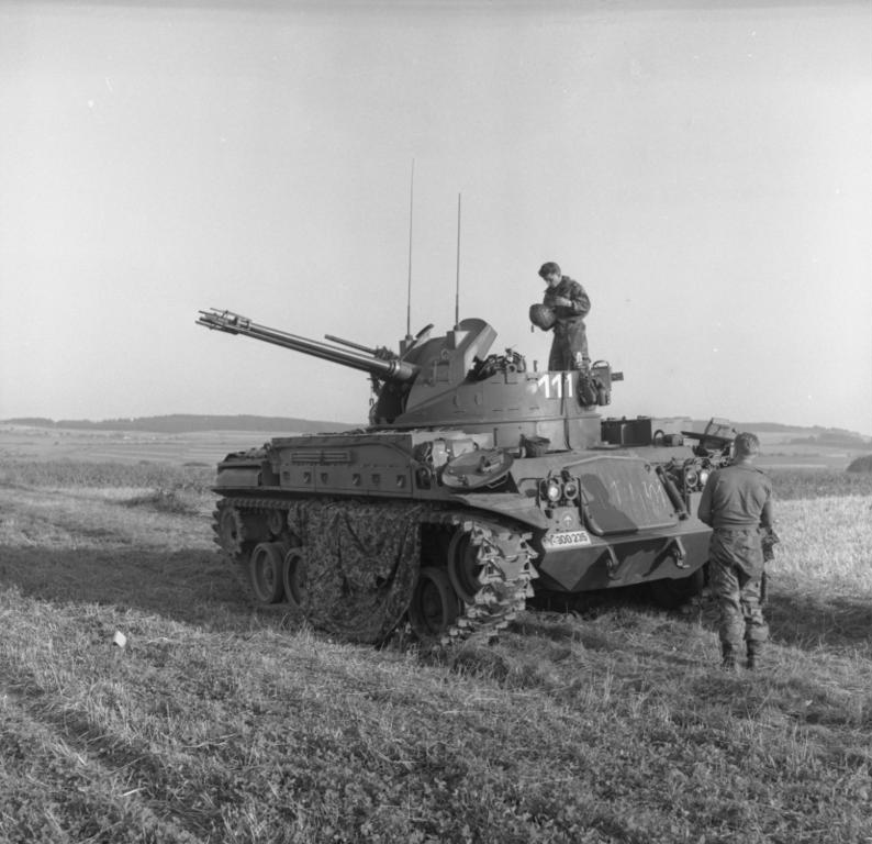 Herbstübung des Heeres: Fla-Panzer im Raum Altenkirchen-Hachenburg (Oberwesterwald)